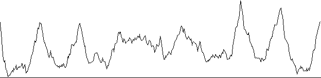 Nutzsignal mit Rauschen